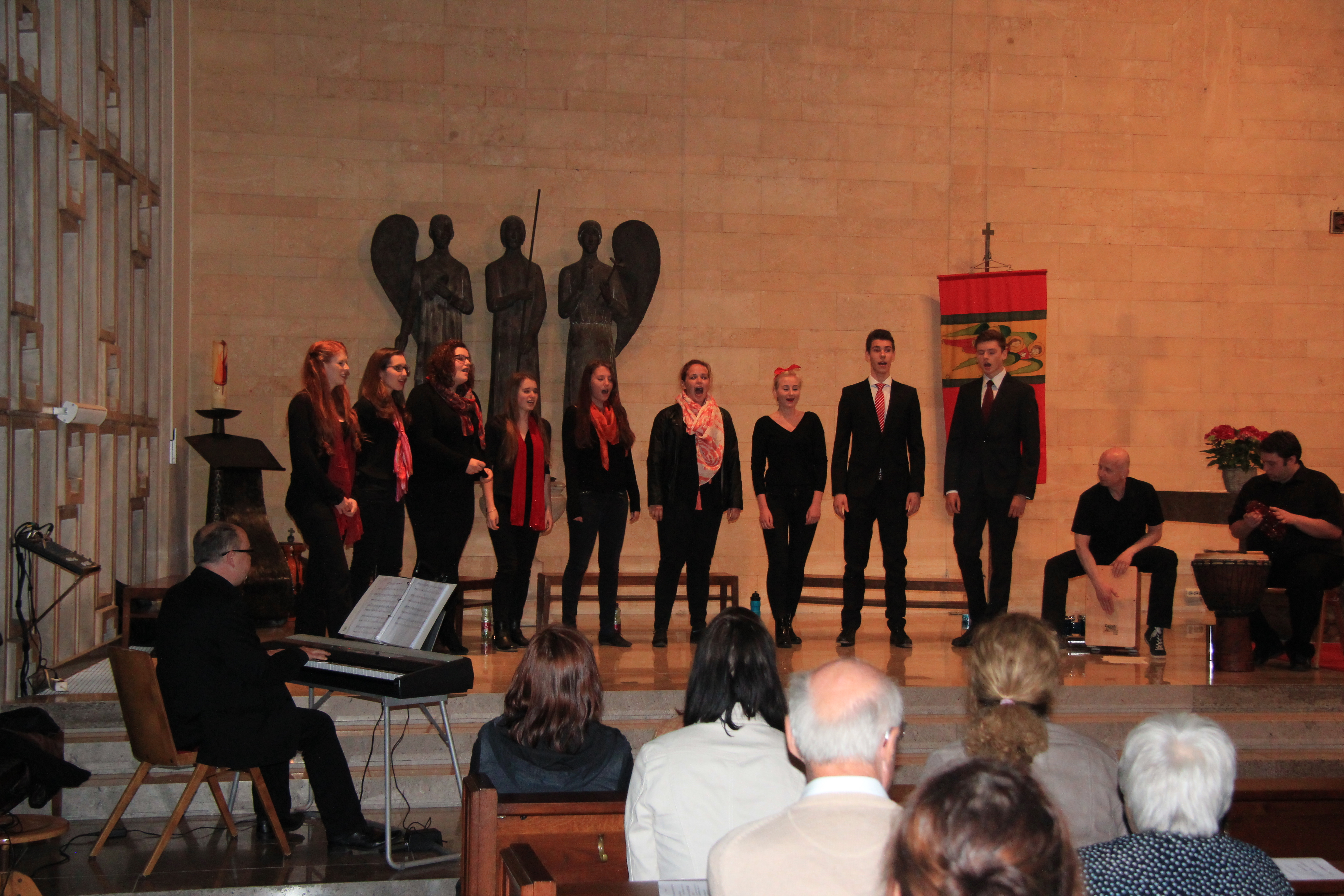 Chor The Young Generation in der Langen Nacht der Kirchen 2015 in der Hinterbrühl, Niederösterreich